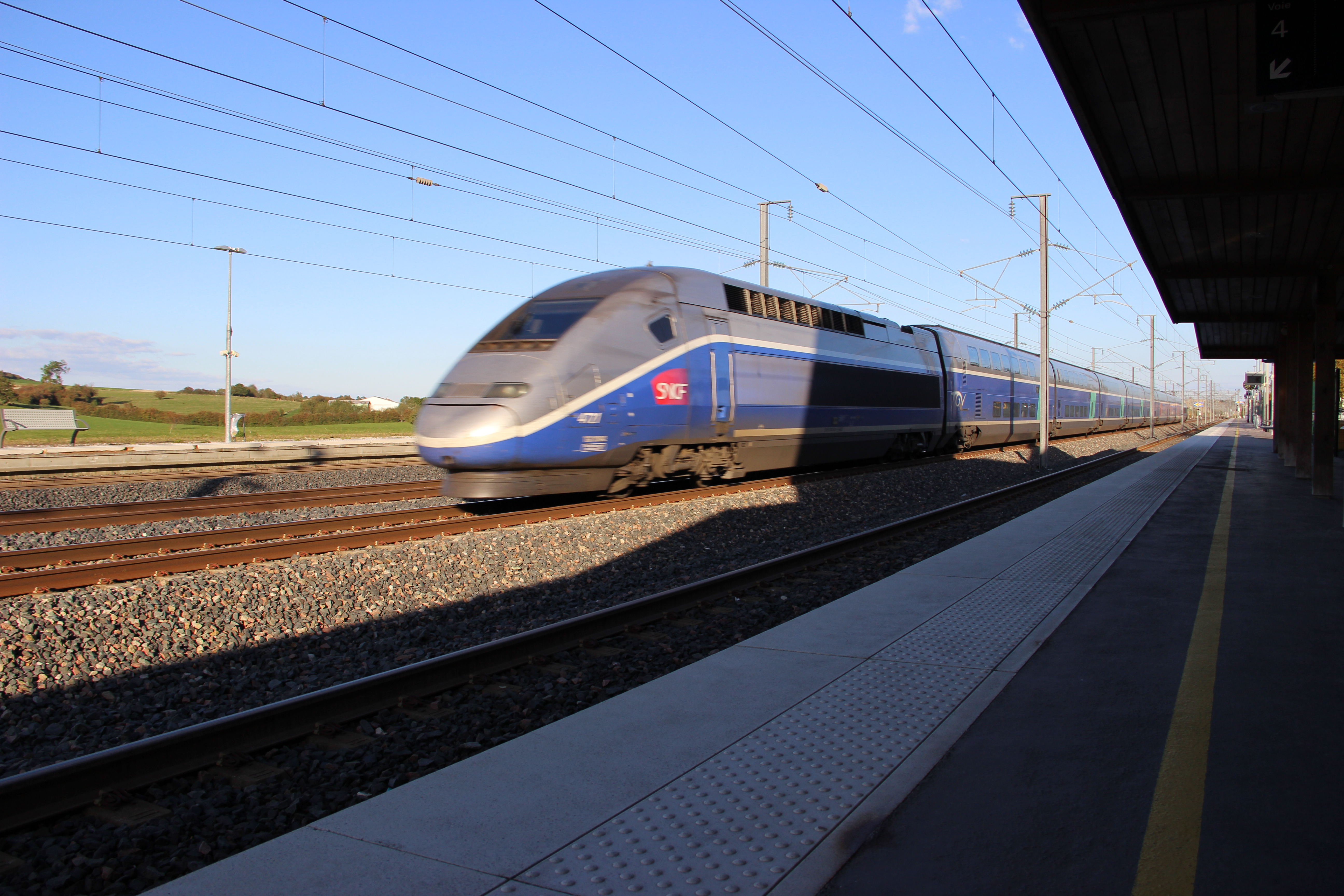 Une rame traverse la gare à pleine vitesse